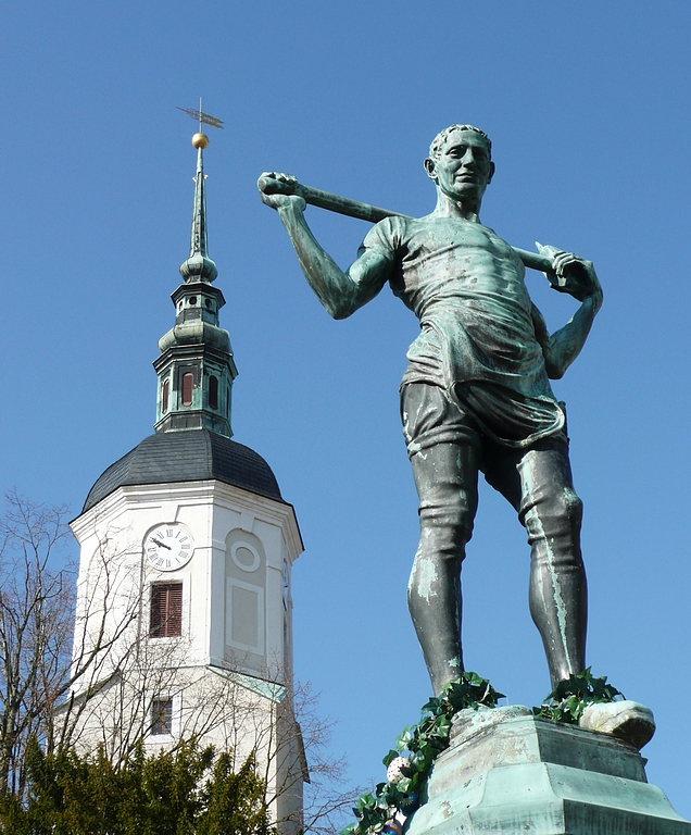 Dohna: Blick auf die Statue des Fleischebrunnens auf dem Marktplatz. Die Dohnaer Fleischerzunft hatte bereits 1462 das Recht erhalten, ihre Waren nach Dresden zu liefern. Daran erinnert der 1912 erbaute Brunnen. Im Hintergrund ist der Turm (erbaut 1684) soätgotischen Marienkirche zu sehen.